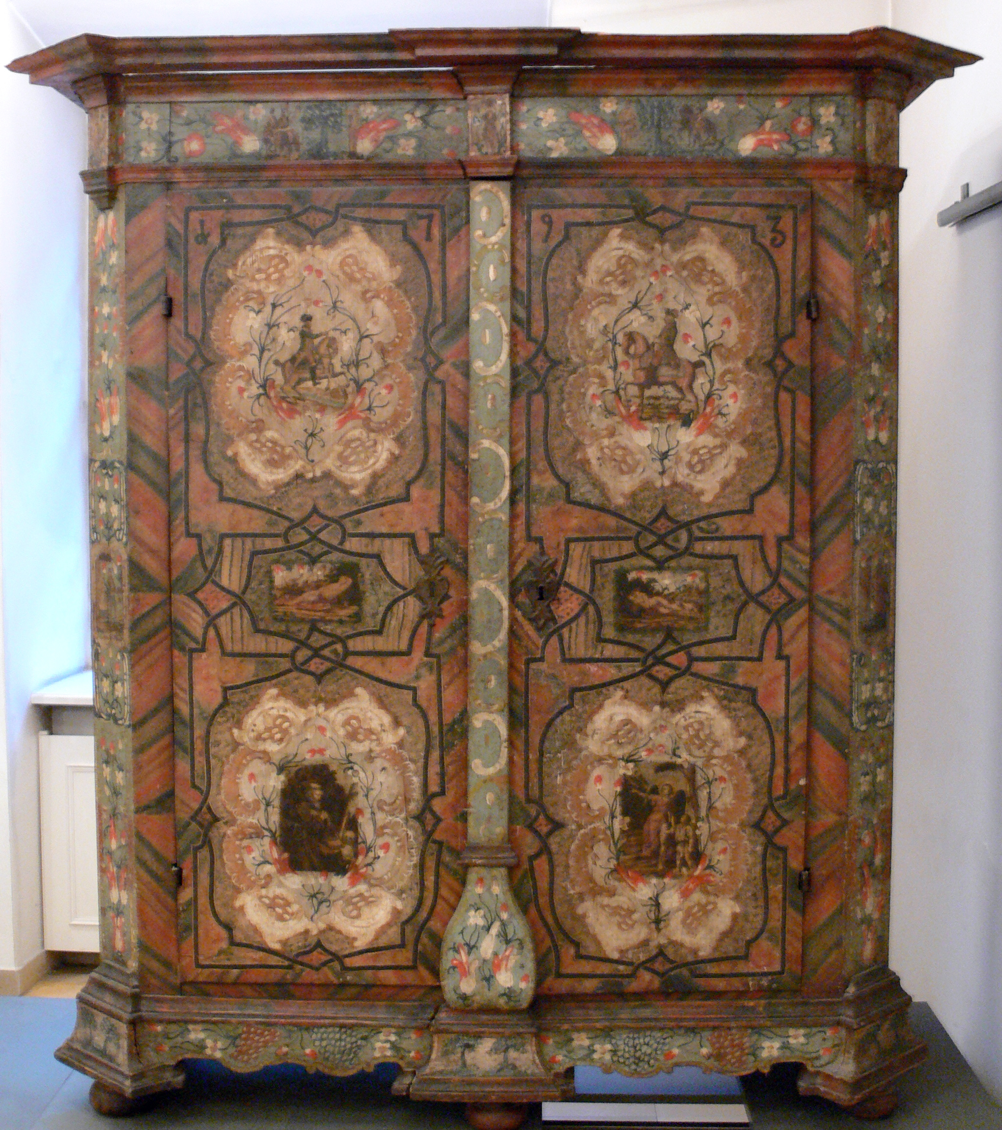 „Linzer Reiterkasten“, Weichholz bemalt, Linz (Oberösterreich), datiert 1793; mit Darstellung Josephs II. und Friedrichs des Großen (Motiv vermutlich in Verbindung mit dem Frieden von Teschen) Wien, Österreichisches Museum für Volkskunde; ÖMV-Inv.nr. 336